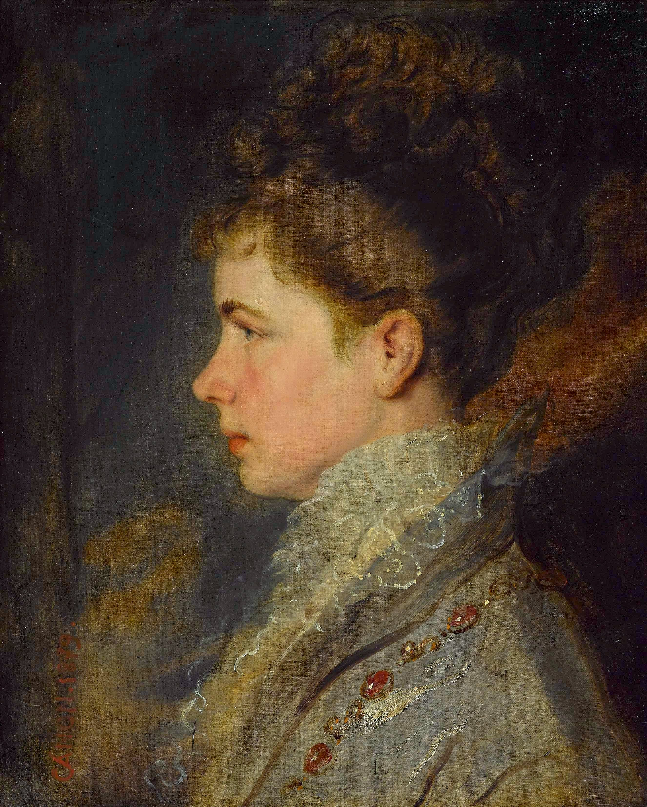 Prinzessin Gisela von Bayern, Erzherzogin von Österreich